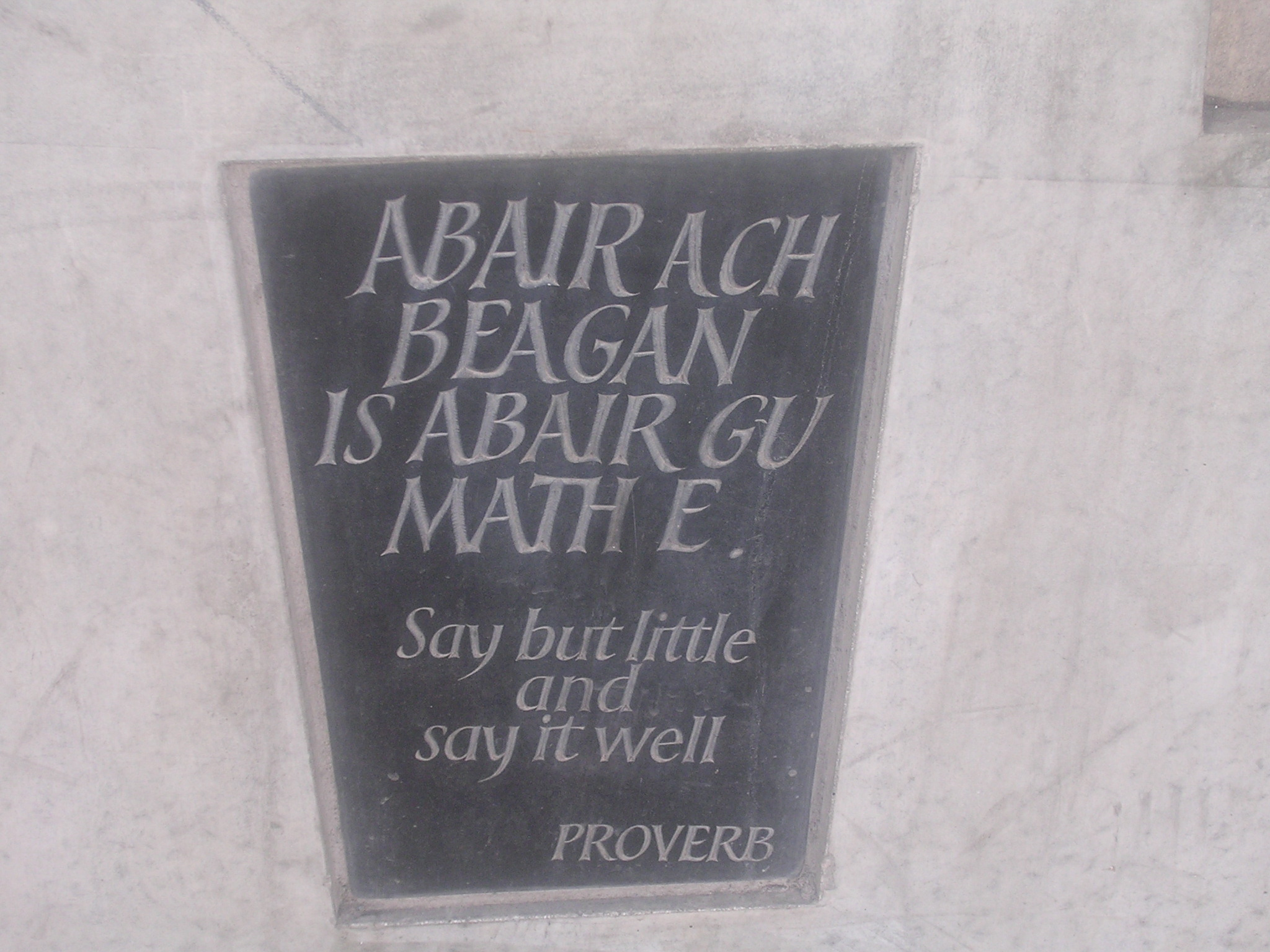 Taken by me, November 2006.